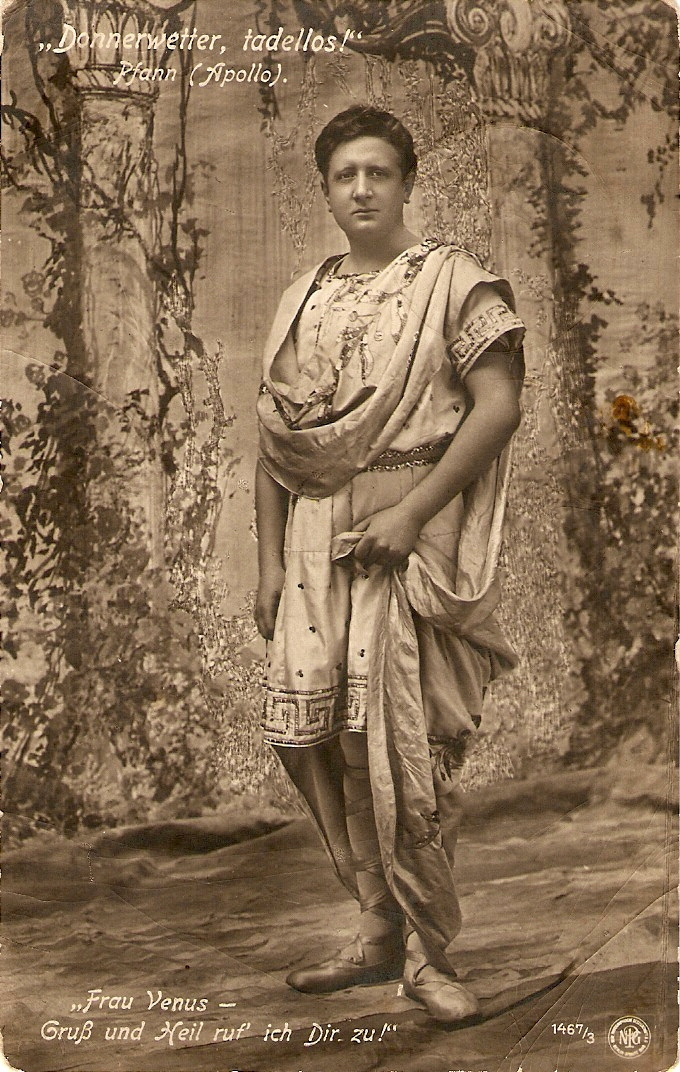 Der österreichische Opernsänger Carl Pfann als Apollo in "Donnerwetter, tadellos"